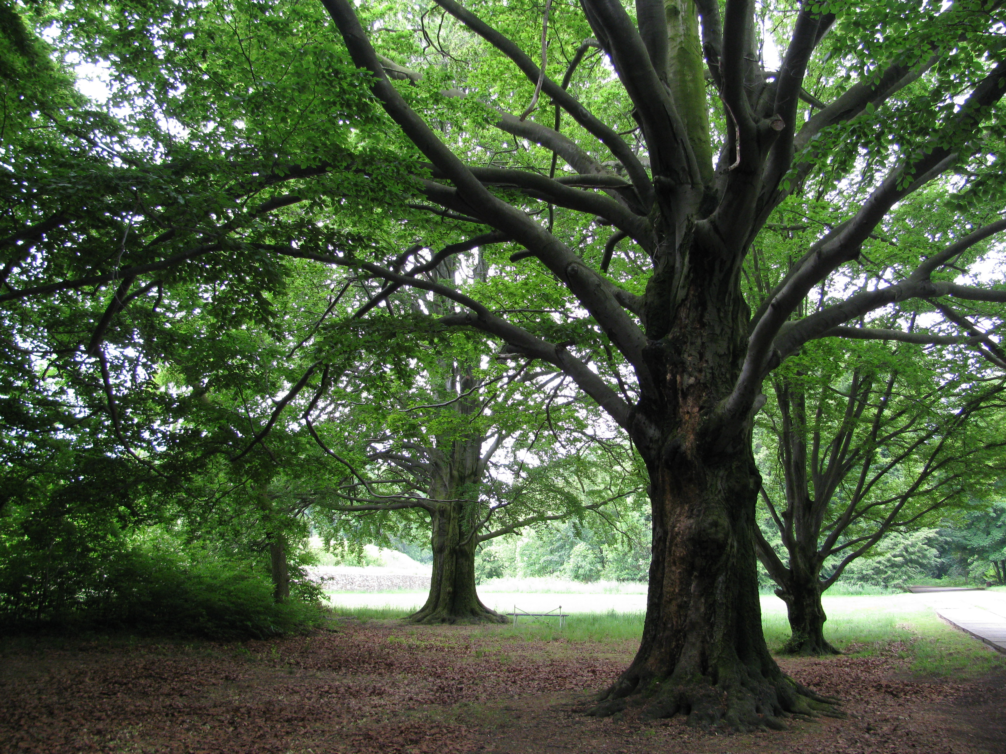 Alte Baumbestände der Rotbuche (Fagus sylvatica) im ehemaligen Schlosspark Altfranken (Lucknerpark), Landeshauptstadt Dresden